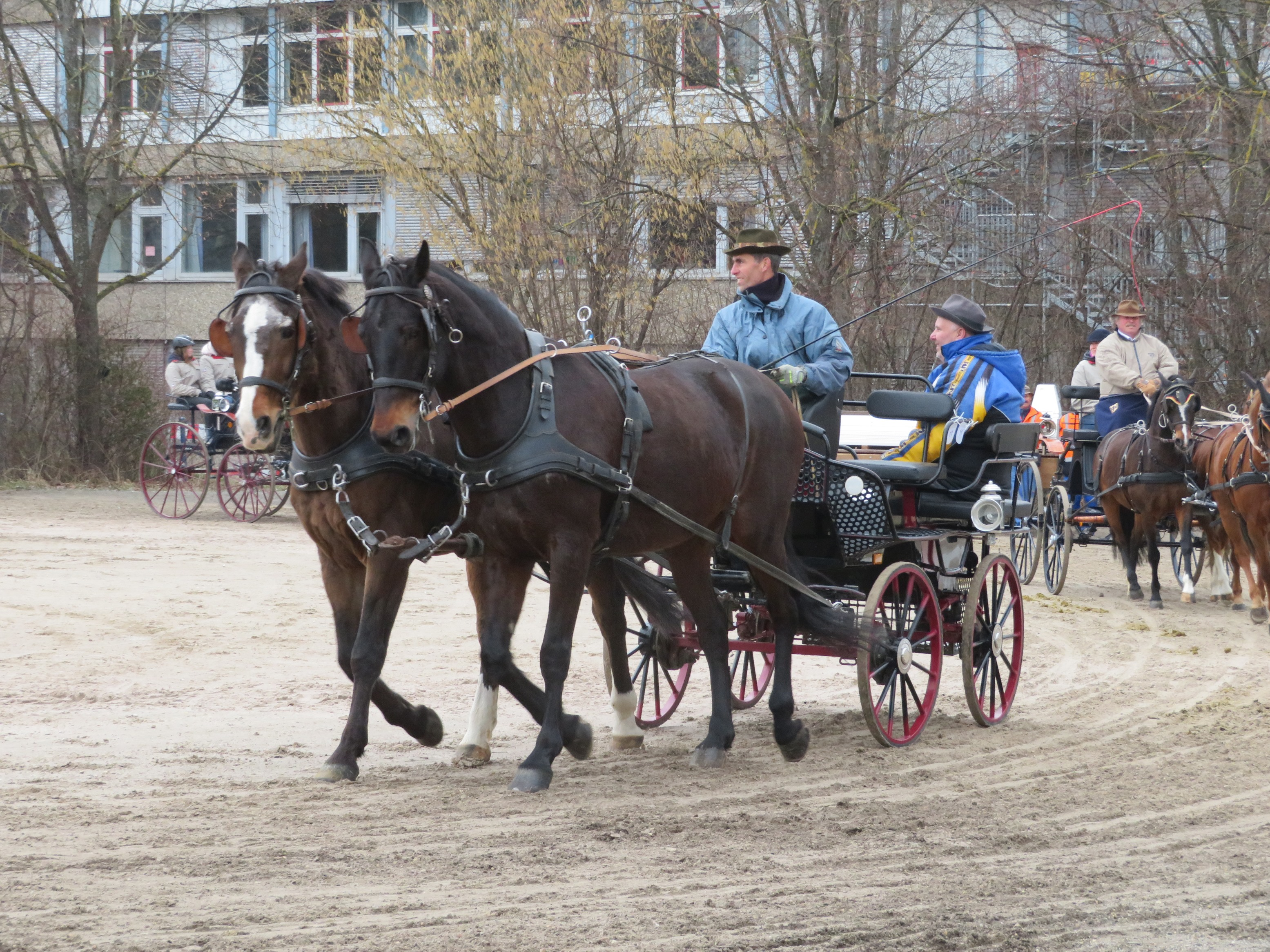 Bernhausener Pferdemarkt 2019